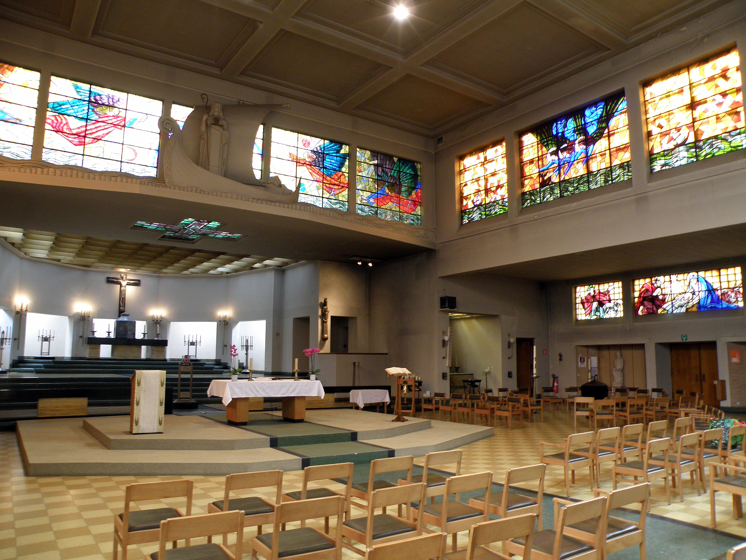 Antwerpen, België. Sint-Walburgiskerk, gelegen aan de Volksstraat nr.41 (ook gevel en ingang aan de Karel Rogierstraat nr.12), anno 1936 in Nieuwe Zakelijkheid gebouwd n.o.v. archit. Flor Van Reeth. Binnenaanzicht. Bas-reliëfs van Simon Goossens, glasramen van Eugeen Yoors.